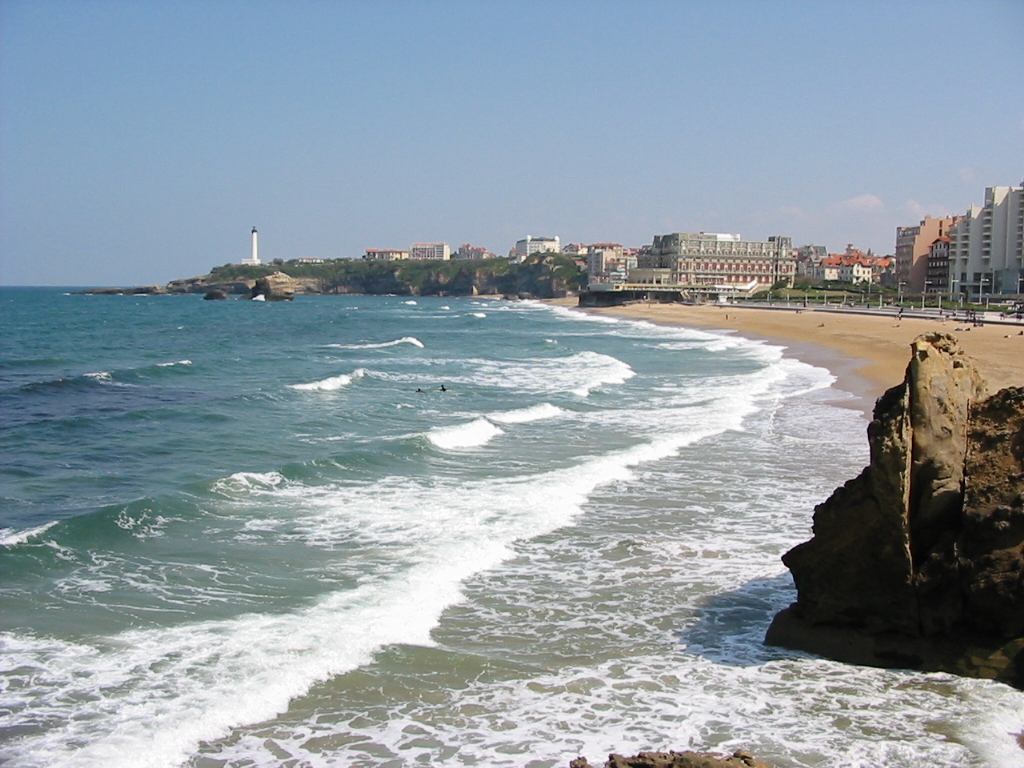 Biarritz au printemps Le phare et la Grande Plage. Photo personnelle du 12 avril 2004. Copyright © Christian Amet